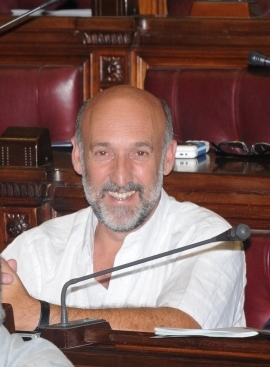 Cámara de Representantes